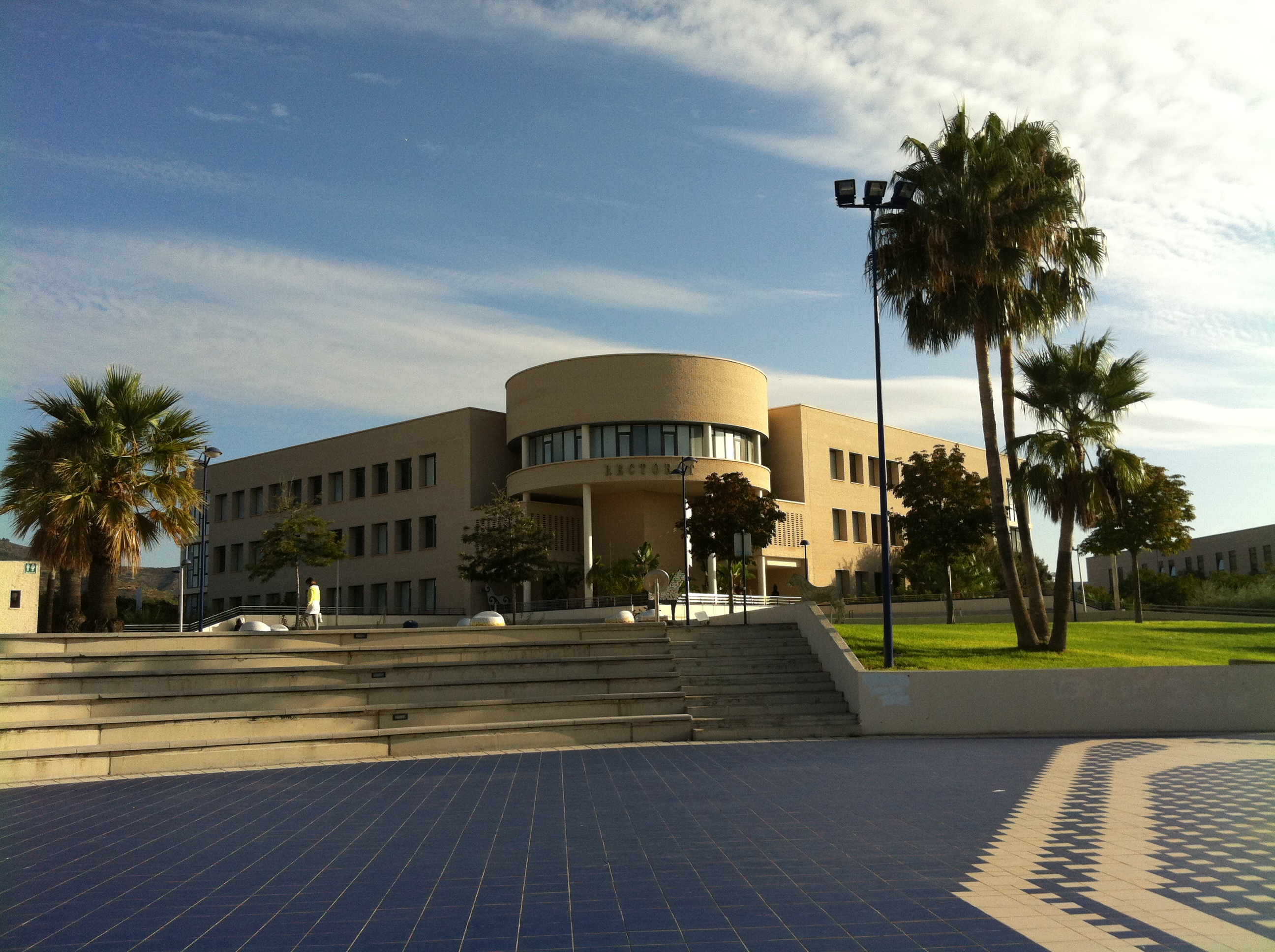 Recorat de la UJI